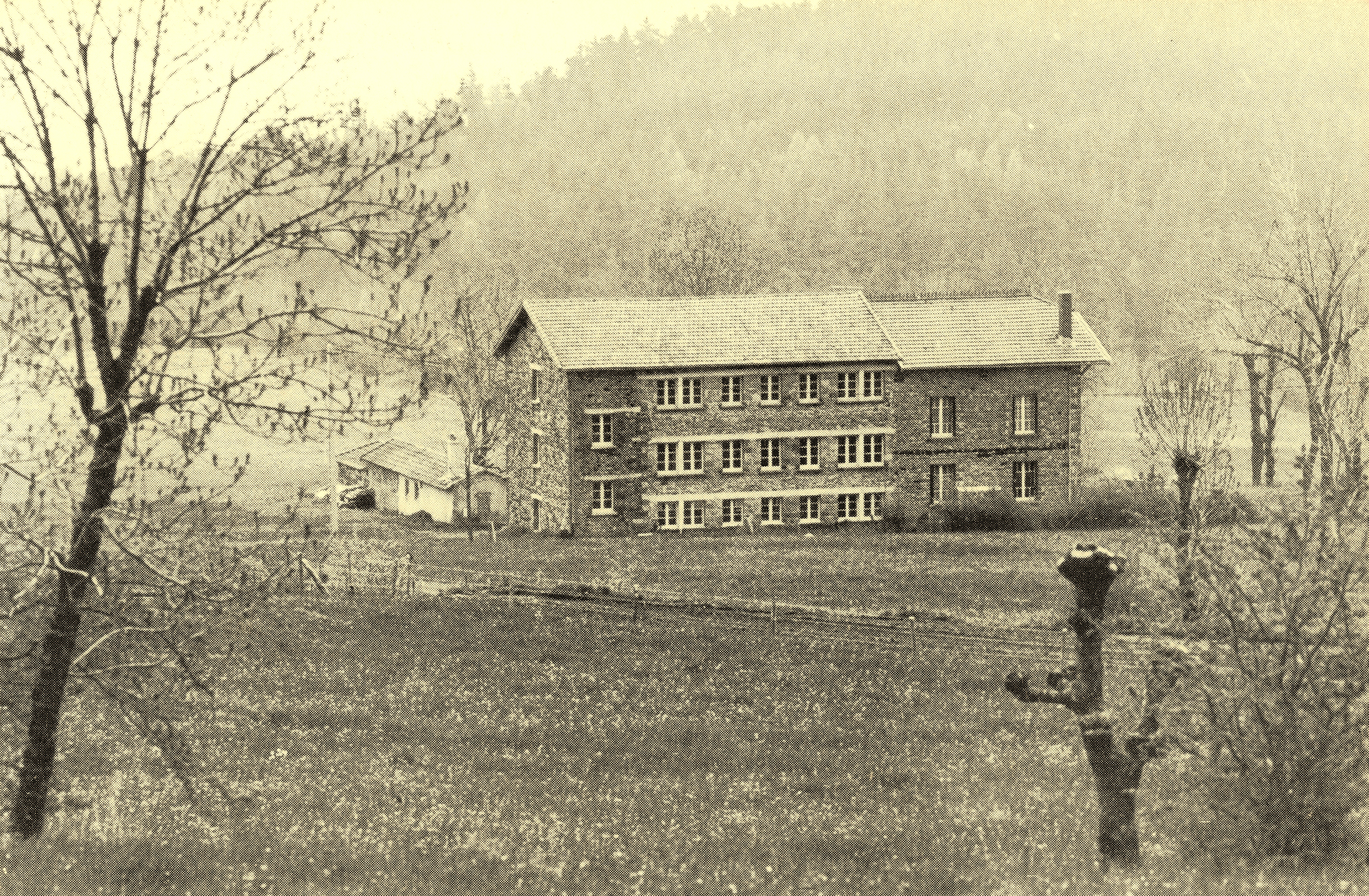 Batiment d'une colonie de vacances en Haute-Loire